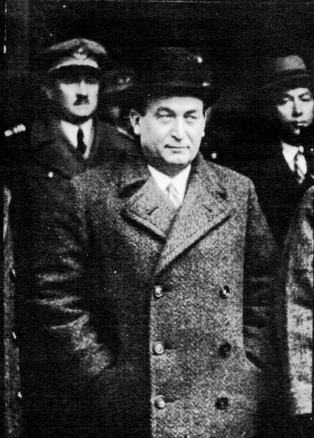 Gyula Gömbos, ministro de Defensa en el gobierno de Gyula Károlyi y su sucesor al frente del gobierno en 1932.